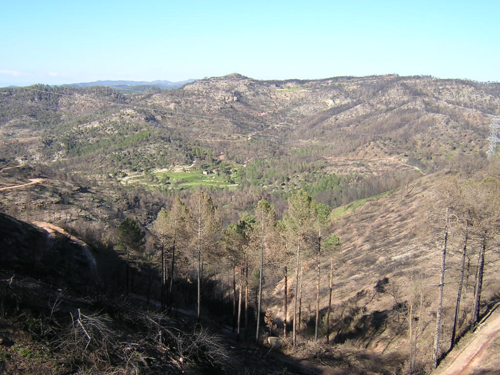 La vall del torrent de l'Hort de l'Om (Monistrol de Calders, Moianès)